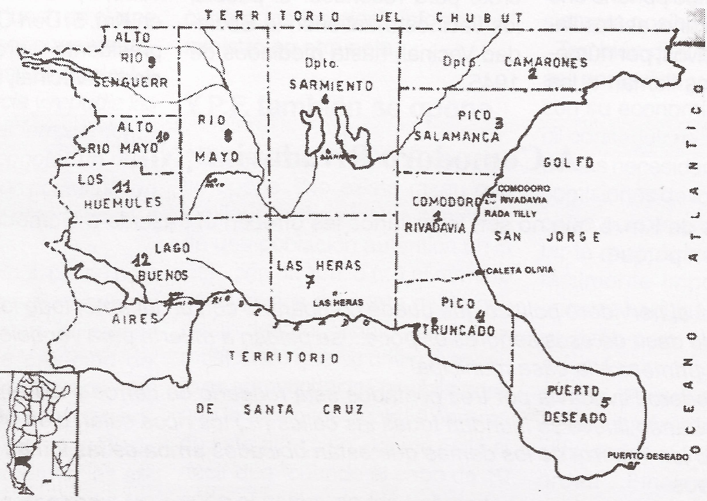 Mapa de la ex goberncaion militar de Comodoro Rivadavia